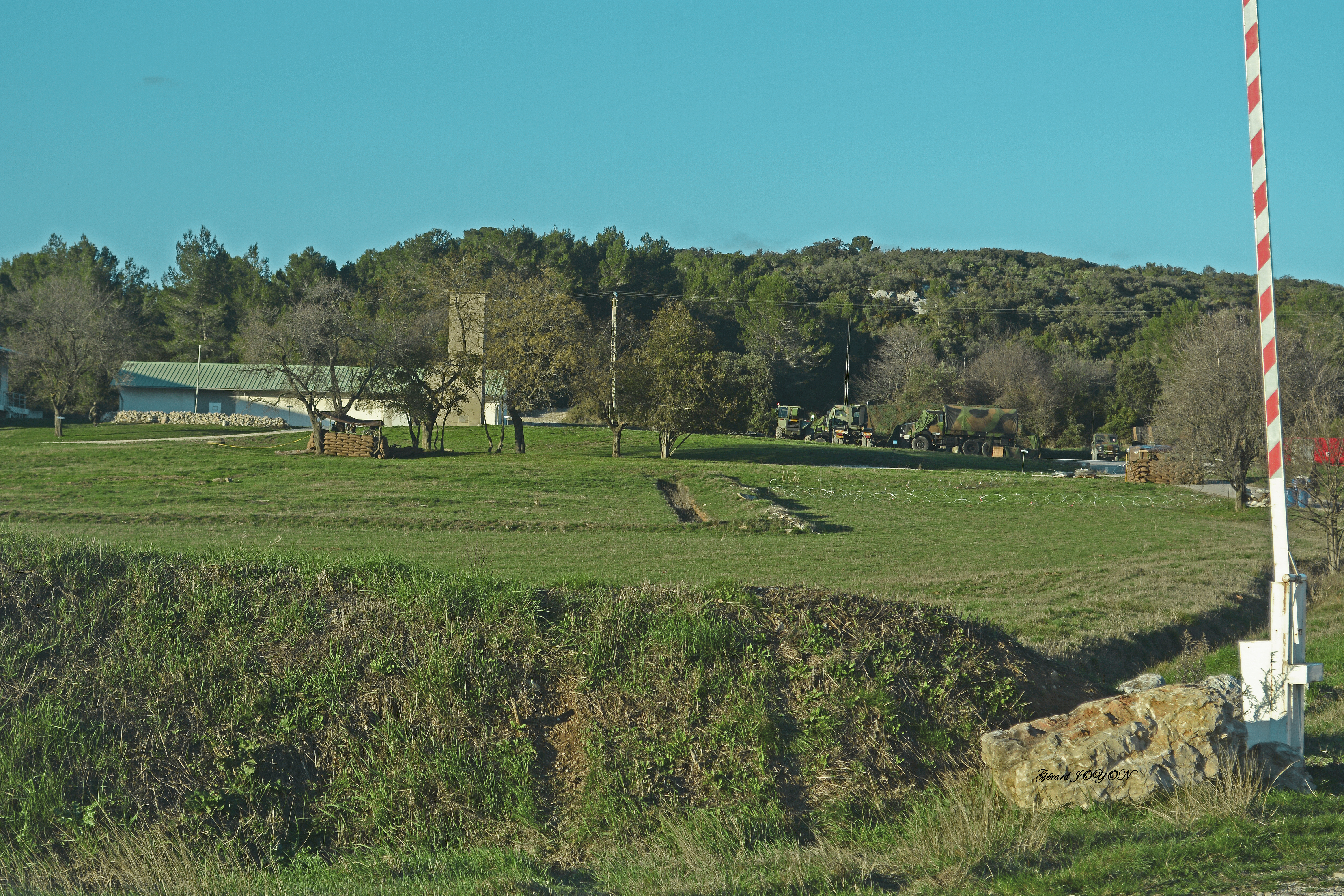 C'est une des nombreuses zones de bivouac que nous trouvons sur le camp . Ici sur cette photo , c'est un détachement du Génie de la Légion qui occupe cette zone. Nous pouvons voir les engins ainsi que les abris de surveillance et protection pour la défense de cette unité.